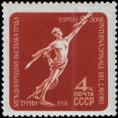 марка Количество показов: 124 Номер ЦФА: 2571 R3: 0,5 Rubric1: Международное сотрудничество SeriesInd: 2571 Год издания: 1961 Месяц издания: 5 Название марки: К звездам (ск. Г. Постникова) Номинал: 4 к. Печать: глубокая Размер границы: 12,5 Тип границы: гребенчатая Тираж: 3000 Художник: В. Пименов